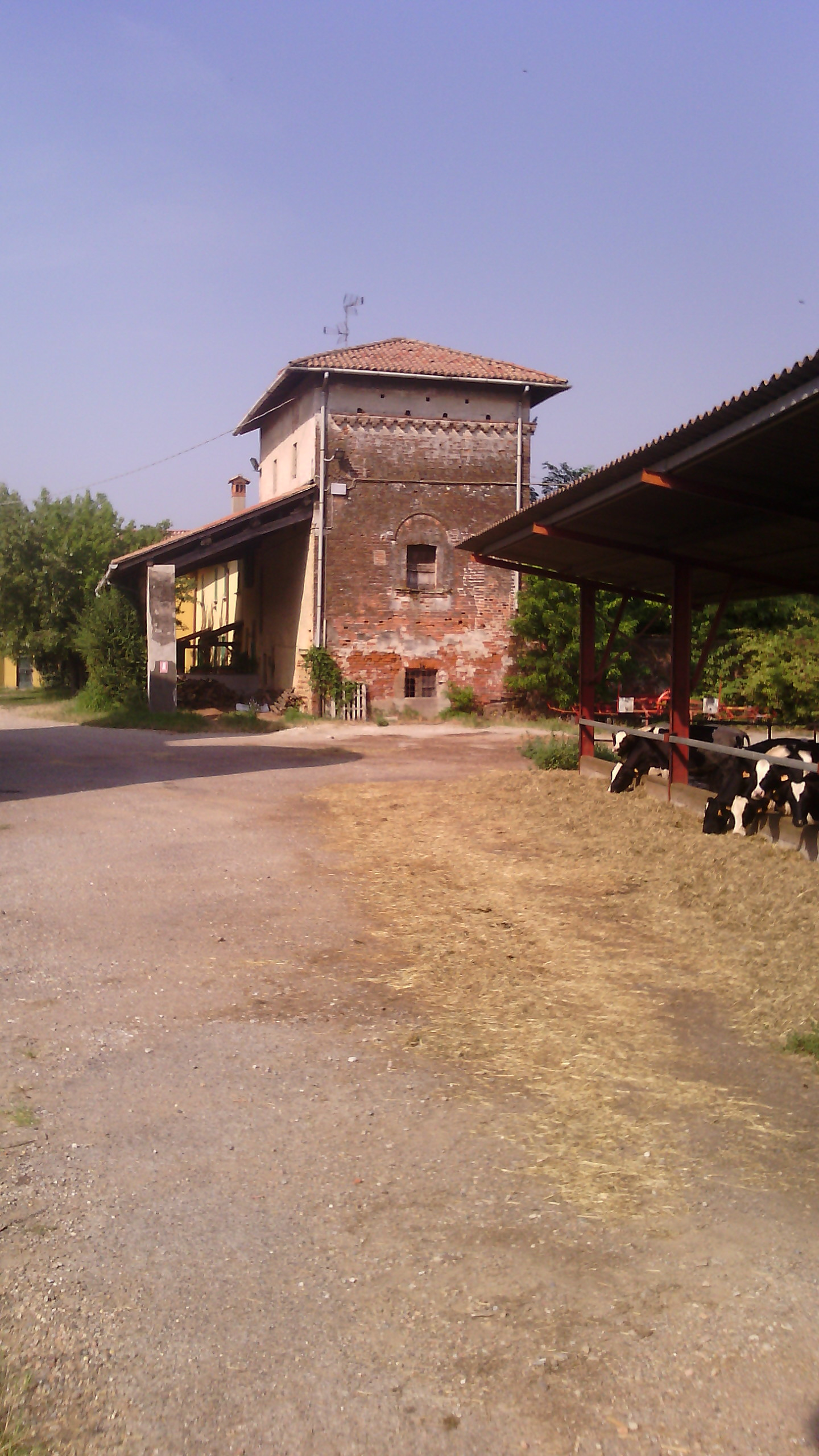 Antica torre nella cascina di Coronate, Morimondo (MI)